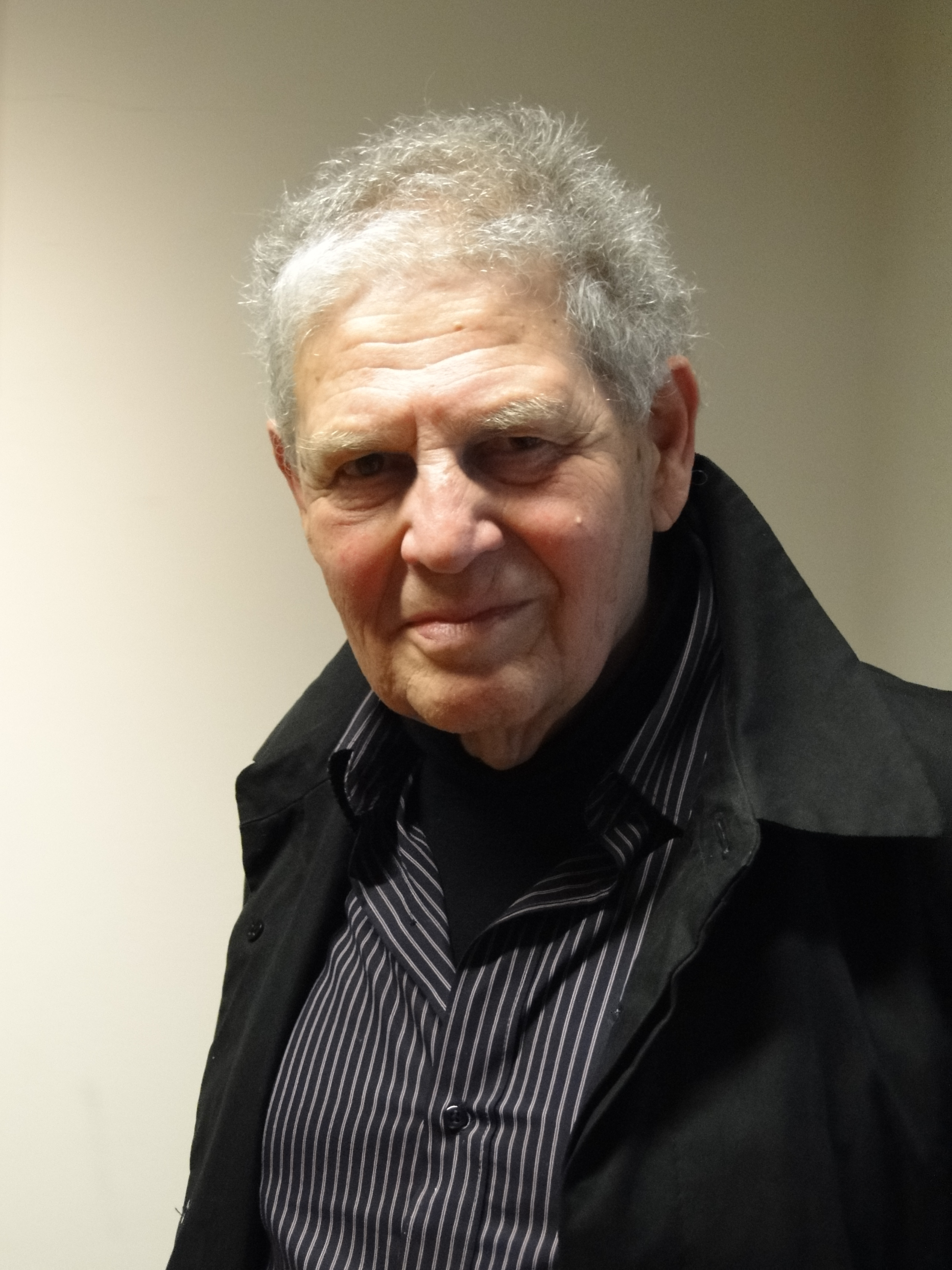 Der deutsche Fotograf Volkmar Jaeger während einer Veranstaltung in Dresden